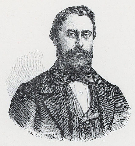 Bruto Fabricatore